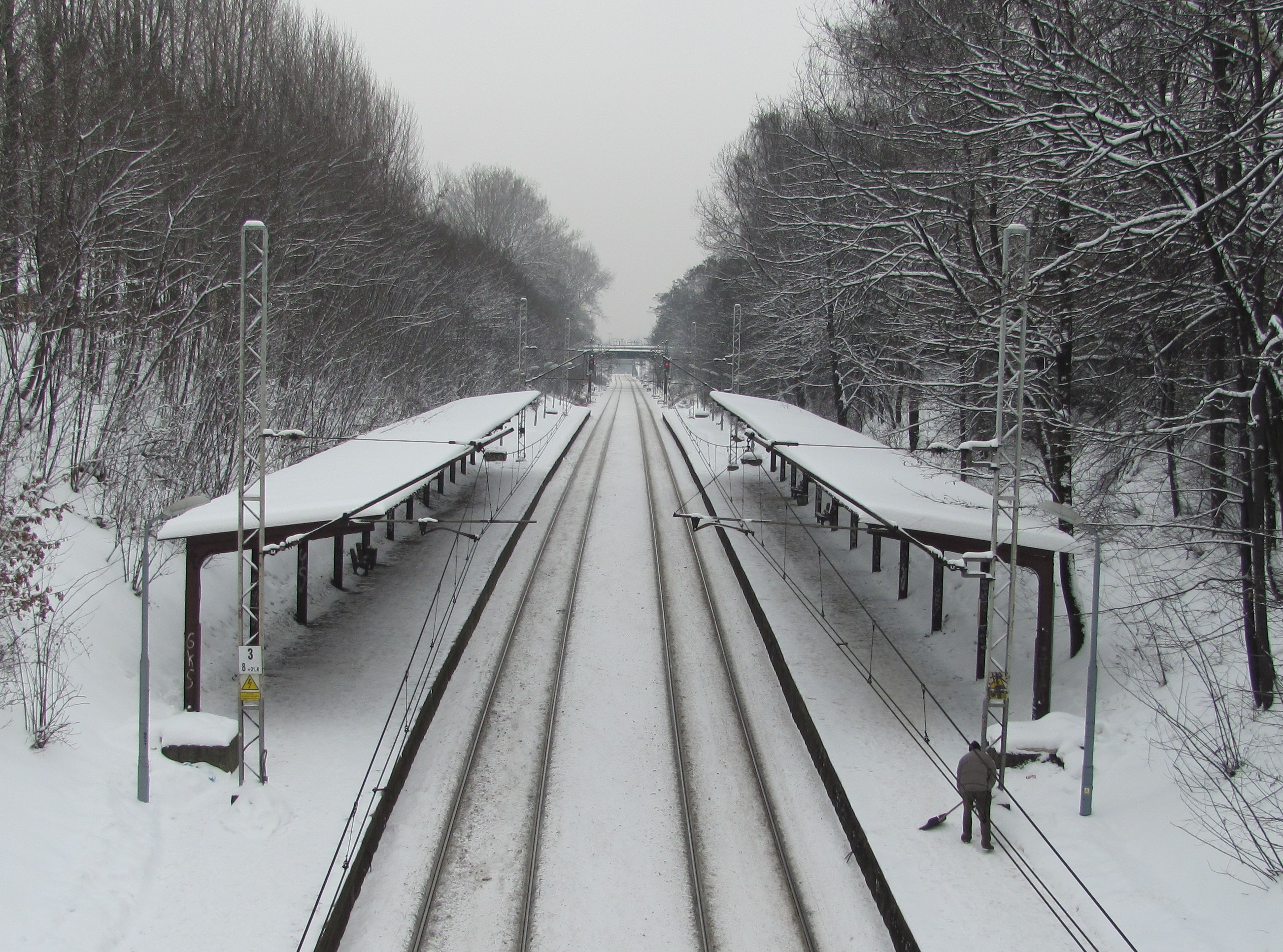 Železniční zastávka Katowice - Brynów, Polsko